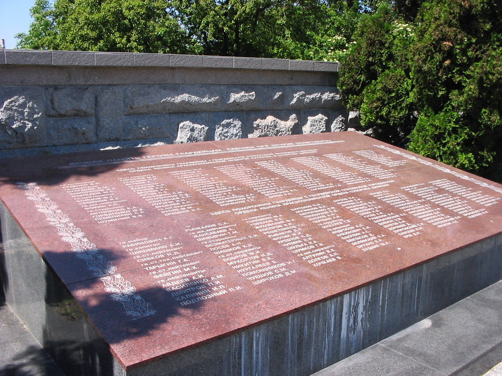 Pamyatnik 1200 gvardeitsam